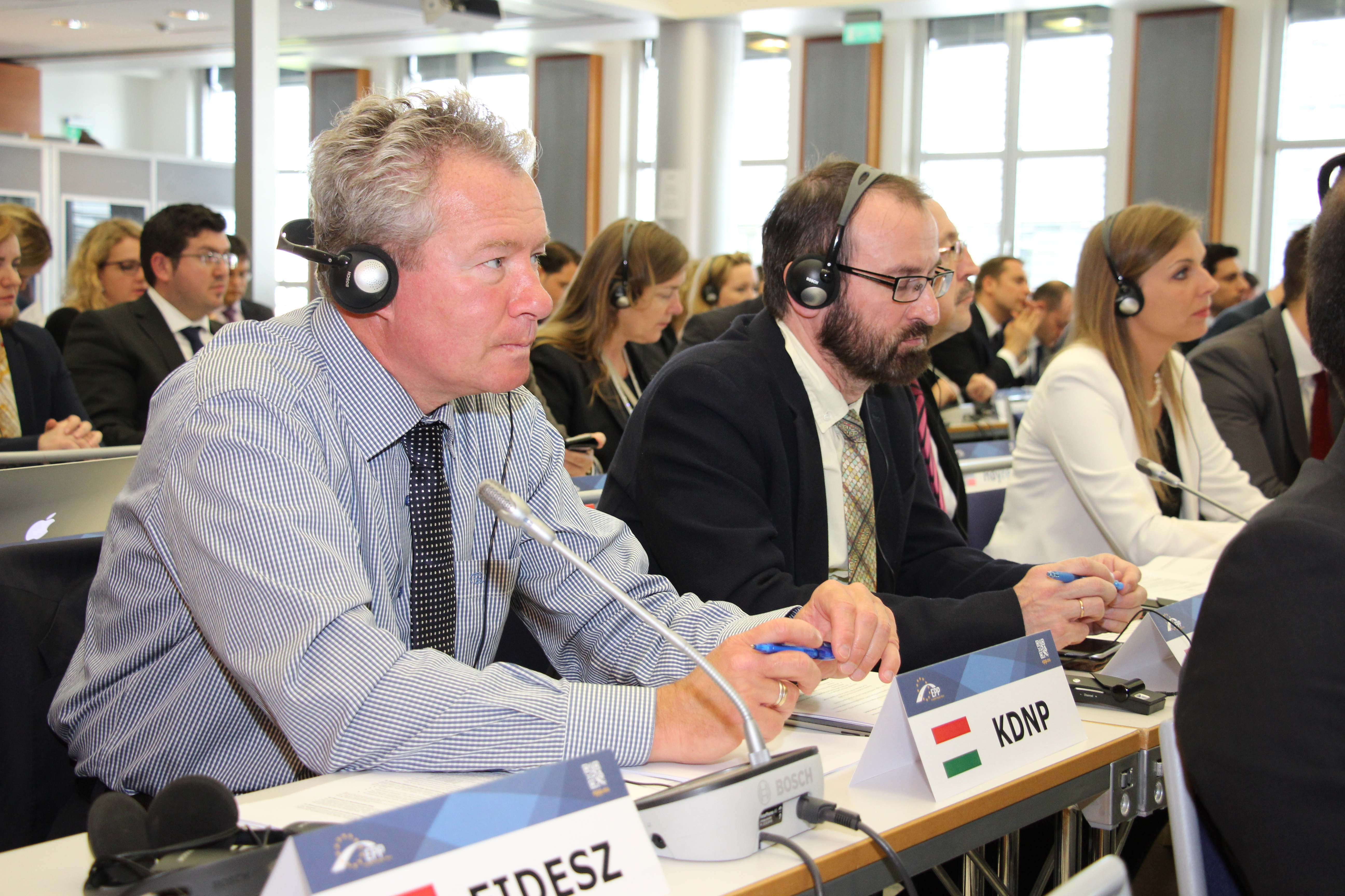 Pálffy István és Szájer József (2015)